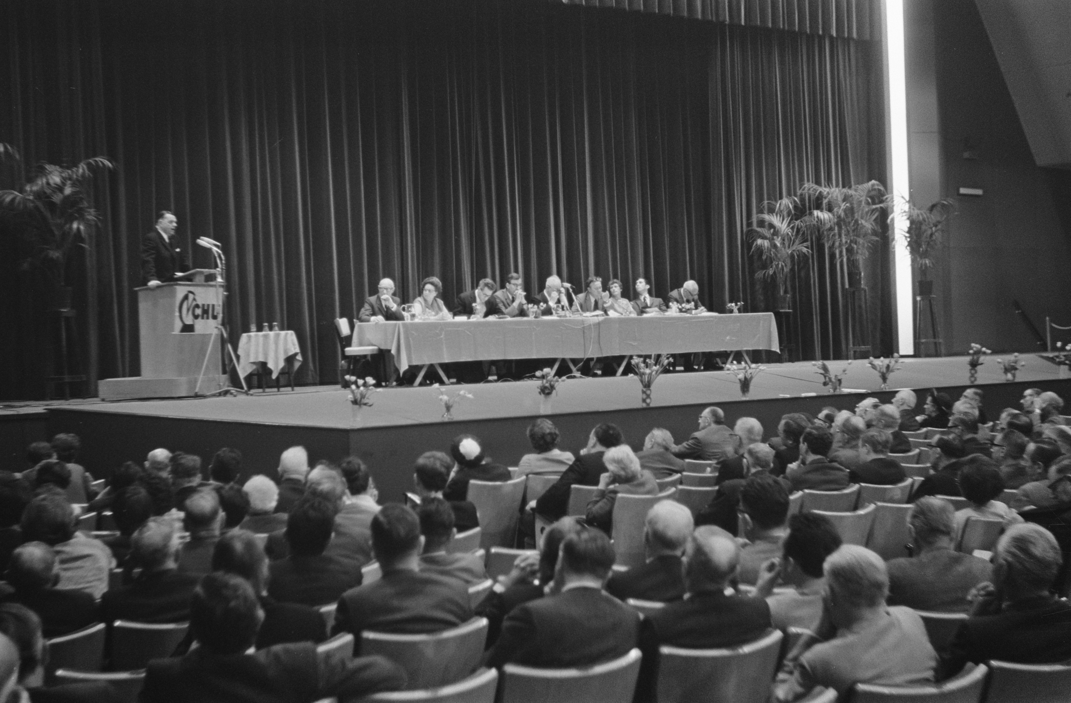 Collectie / Archief : Fotocollectie Anefo Reportage / Serie : [ onbekend ] Beschrijving : Algemene Vergadering CHU in Tivoli, Utrecht nr. 9 , 10: W. Scholten , nr. 11a : overzicht Datum : 17 mei 1969 Locatie : Utrecht Trefwoorden : Vergaderingen Persoonsnaam : Scholten, Willem Instellingsnaam : CHU, Tivoli Fotograaf : Evers, Joost / Anefo Auteursrechthebbende : Nationaal Archief Materiaalsoort : Negatief (zwart/wit) Nummer archiefinventaris : bekijk toegang 2.24.01.05 Bestanddeelnummer : 922-4247